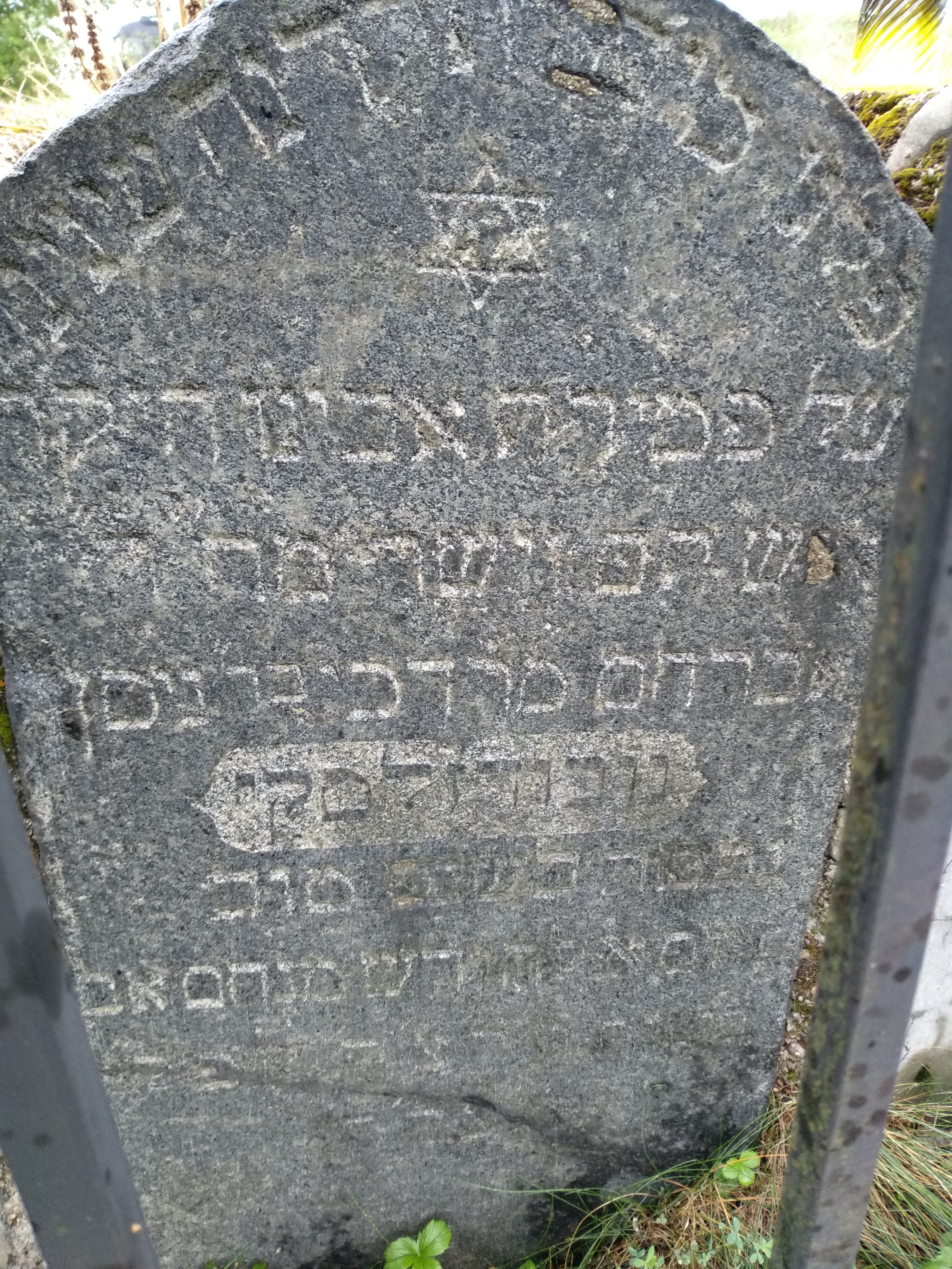 Nagrobek na cmentarzu żydowskim w Kuźnicy.